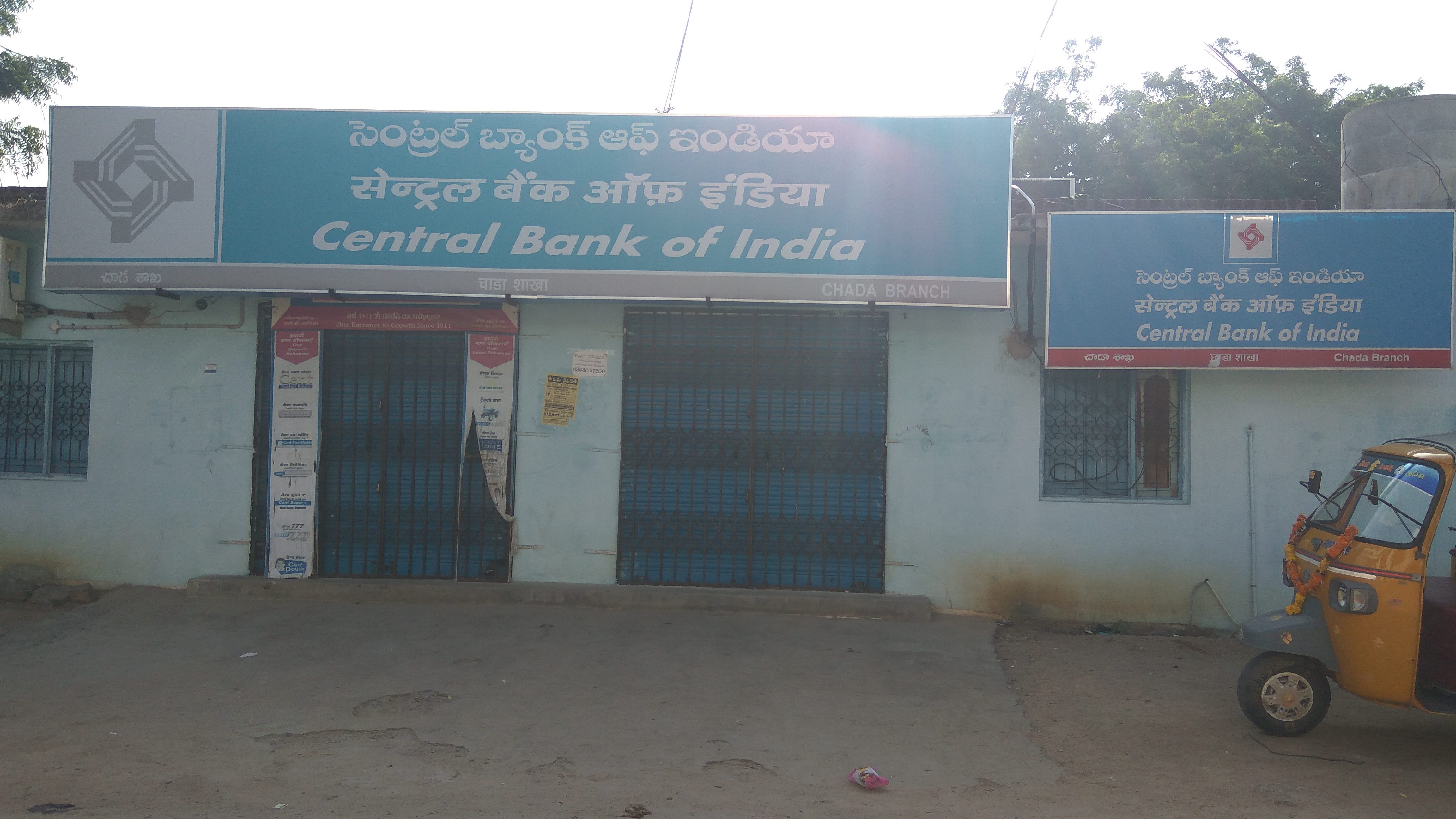 ముత్తిరెడ్డి గూడెంలోని బ్యాంక్